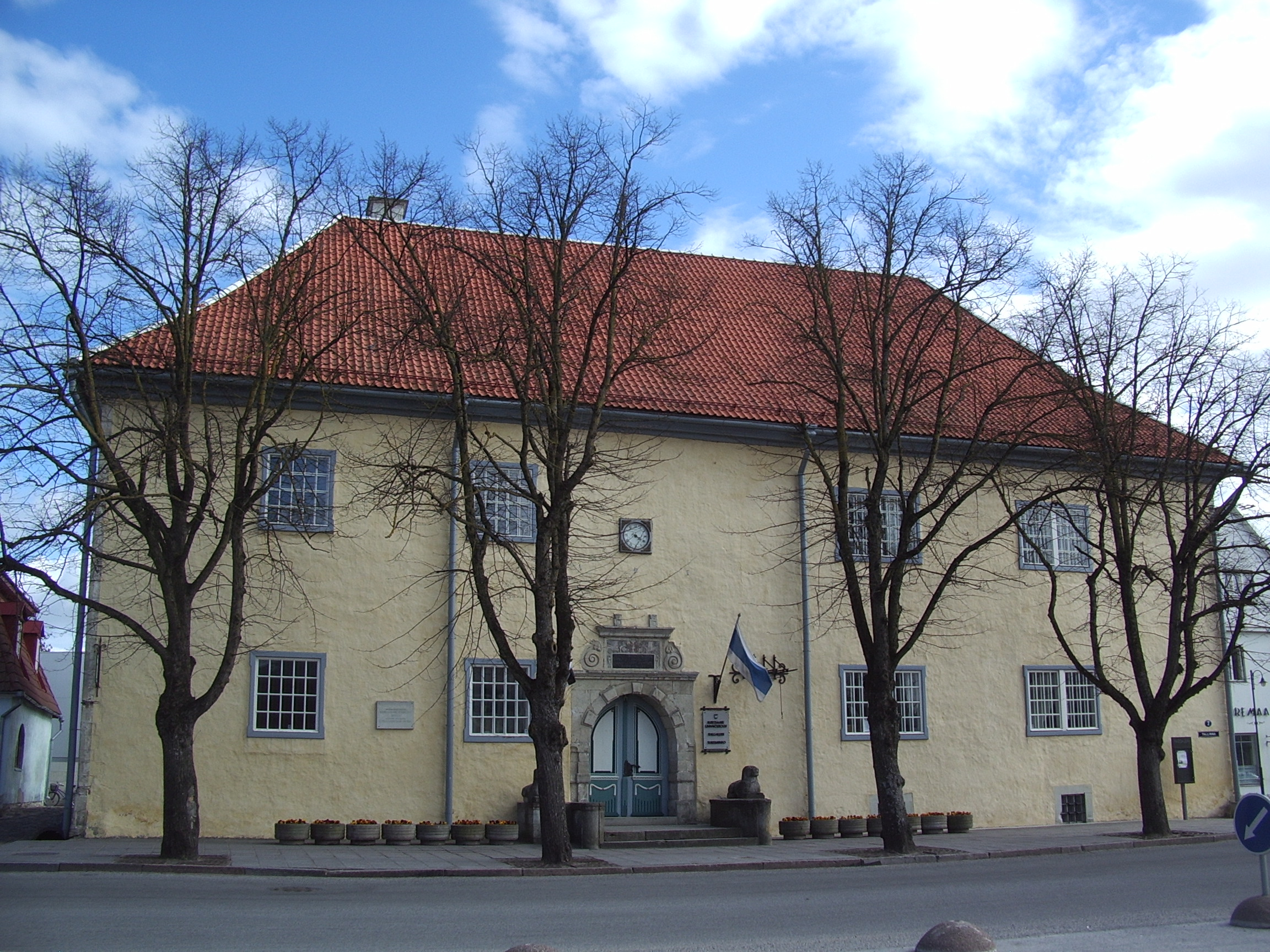 Kuressaare raekoda (Tallinna tänav 2)